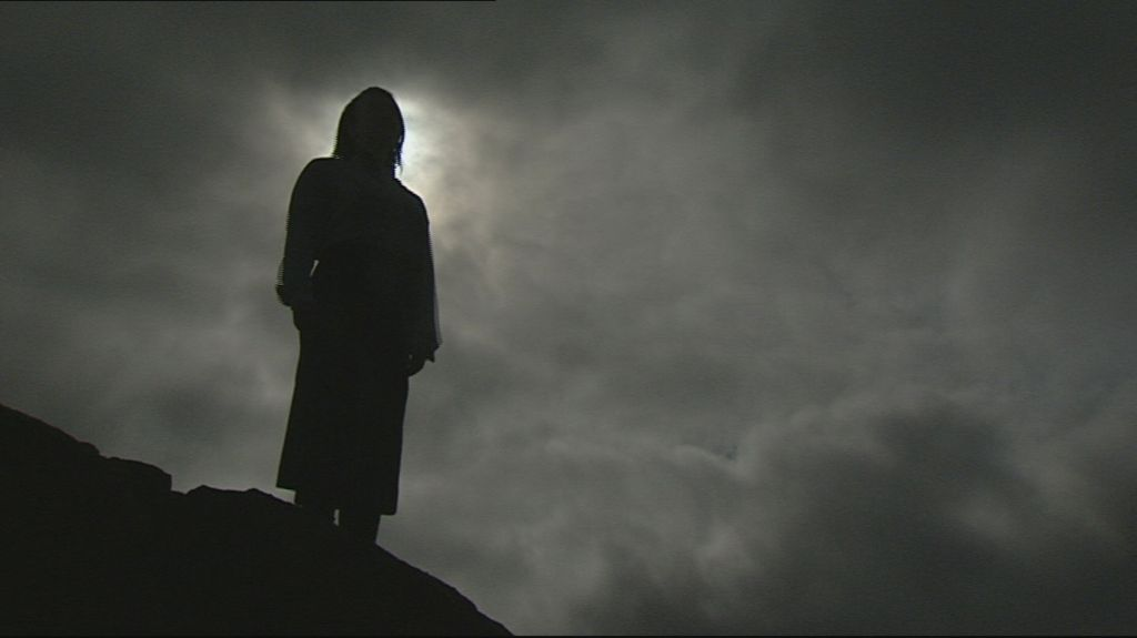 Silhouette en contre jour dans l'archipel de Saint-Kilda